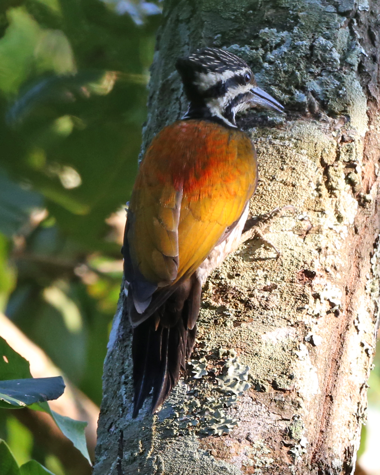 Himalayan Flameback Dinopium shorii Dinopium shorii shorii 12 September 2015 Chitwan, Nepal CF2P0138